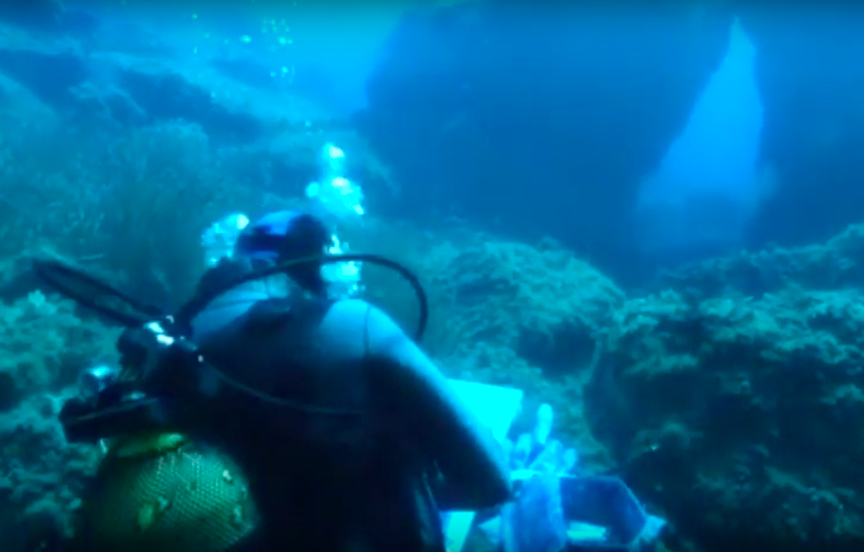 Réalisation par André Laban d'une toile sous-marine le 22 septembre 2015 lors de sa dernière plongée à l'âge de 87 ans au Cap des Mèdes.